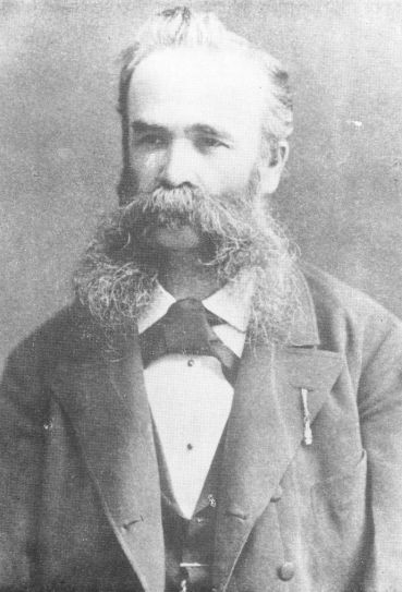 Ioan Pușcariu (n. 10 octombrie 1824, Sohodolul Branului, Brașov - d. 24 decembrie 1911, Bran, Brașov)